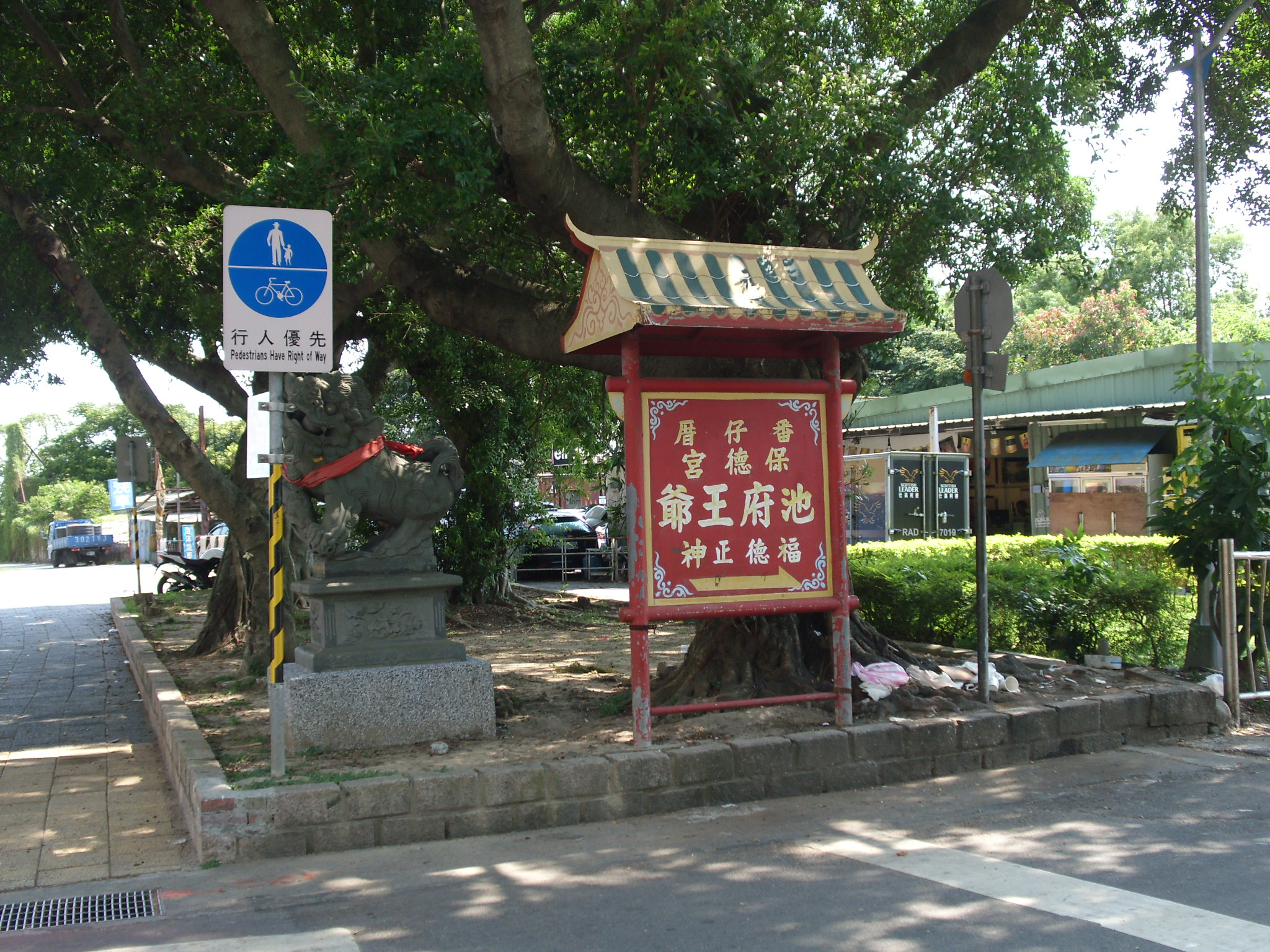 Bân-lâm-gú: 臺北北投大業路517巷巷仔口的番仔厝保德宮入口告示牌，入去正手爿是番仔溝，第一个橋過去有一个小公園，叫番仔厝綠地，閣過就是番仔厝，猶看有一寡古早厝，若保德宮就愛順517巷閣入去一段路才看會著，起佇溝仔頂。